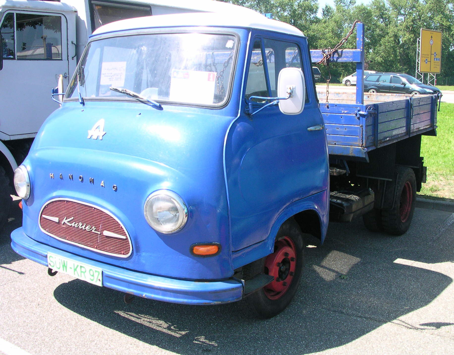 Hanomag Kurier in Wörth am Rhein beim Oldtimer-Treffen bei Daimler-Chrysler